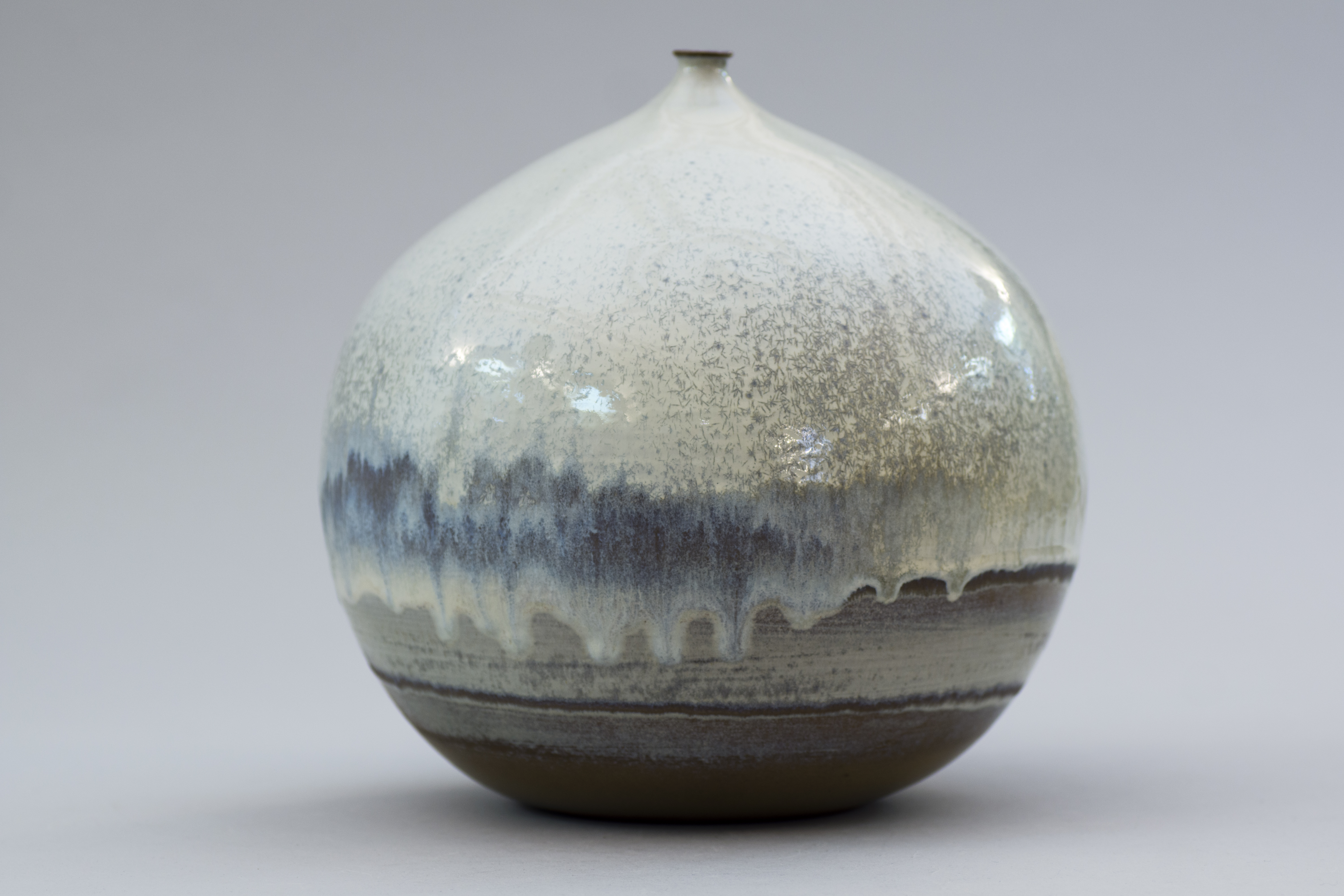 Antonio Lampecco (né en 1932), pièce tournée en terre blanche d’Andenne, émail à base de cobalt-zinc, 1960, H. 24 cm, D. 24 cm, acquisition par la Fédération Wallonie-Bruxelles en dépôt au Musée de la céramique d’Andenne, LAMD003-APC.27289/3 This is a file created at the museum: Ceramic Museum in Andenne